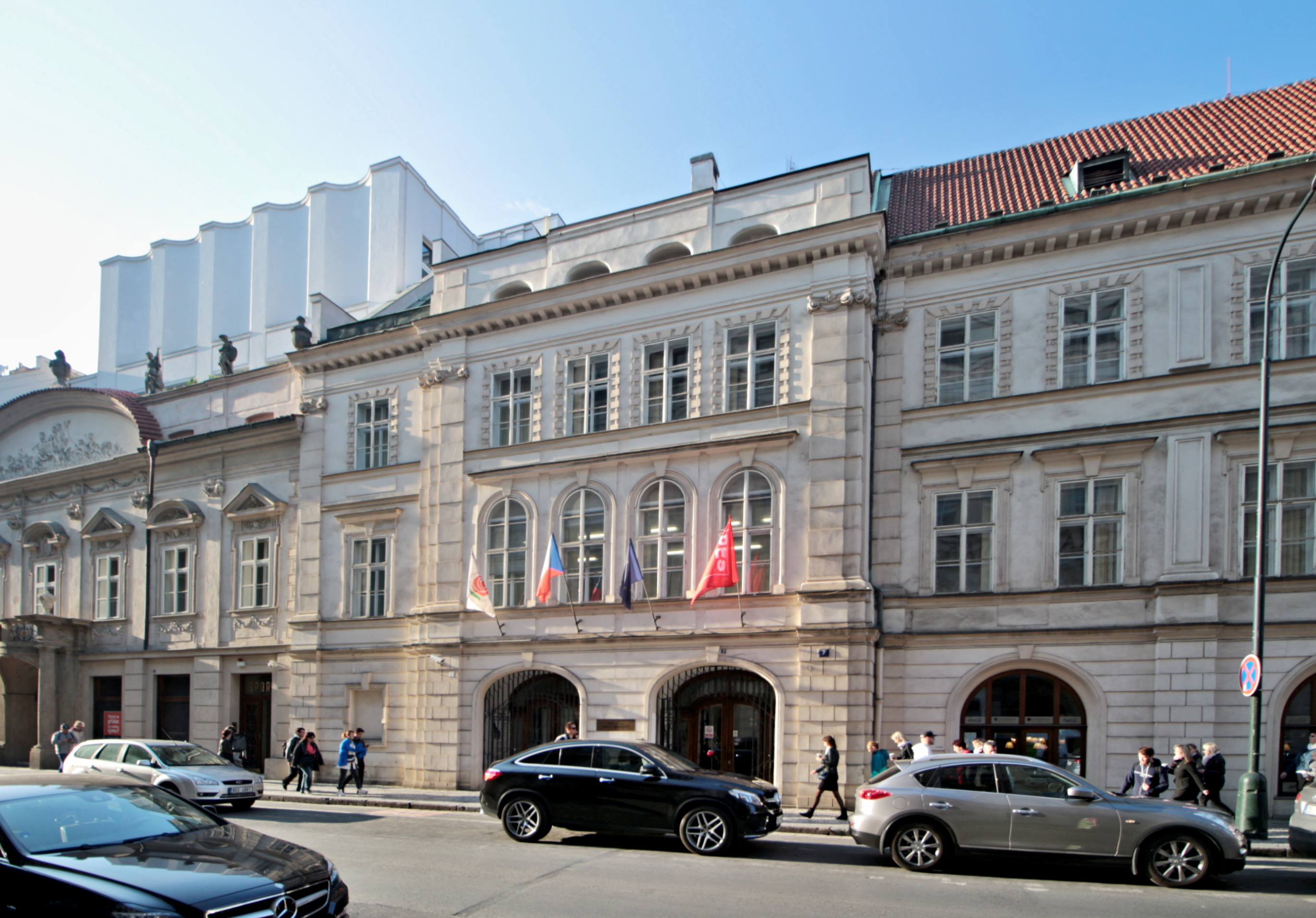 Praha-Hybernská ulice, Losyovský palác (též Lidový dům)